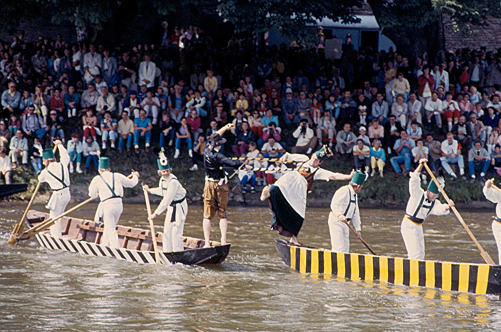 Fischerstechen in Ulm